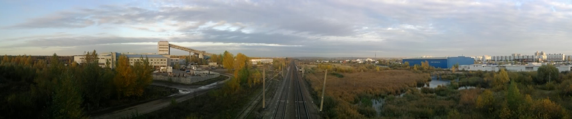 Панорама платформы 797 км